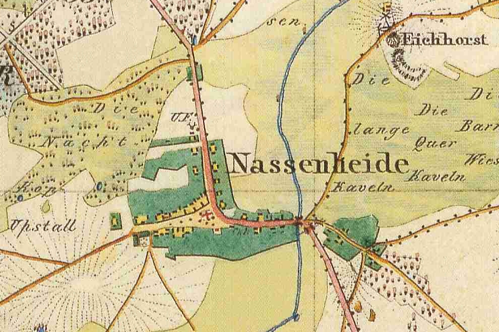 Karte von Nasseheide, Kreis Niederbarnim, Provinz Brandenburg, 1840